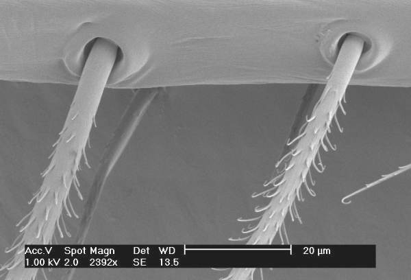 Trichobothrium